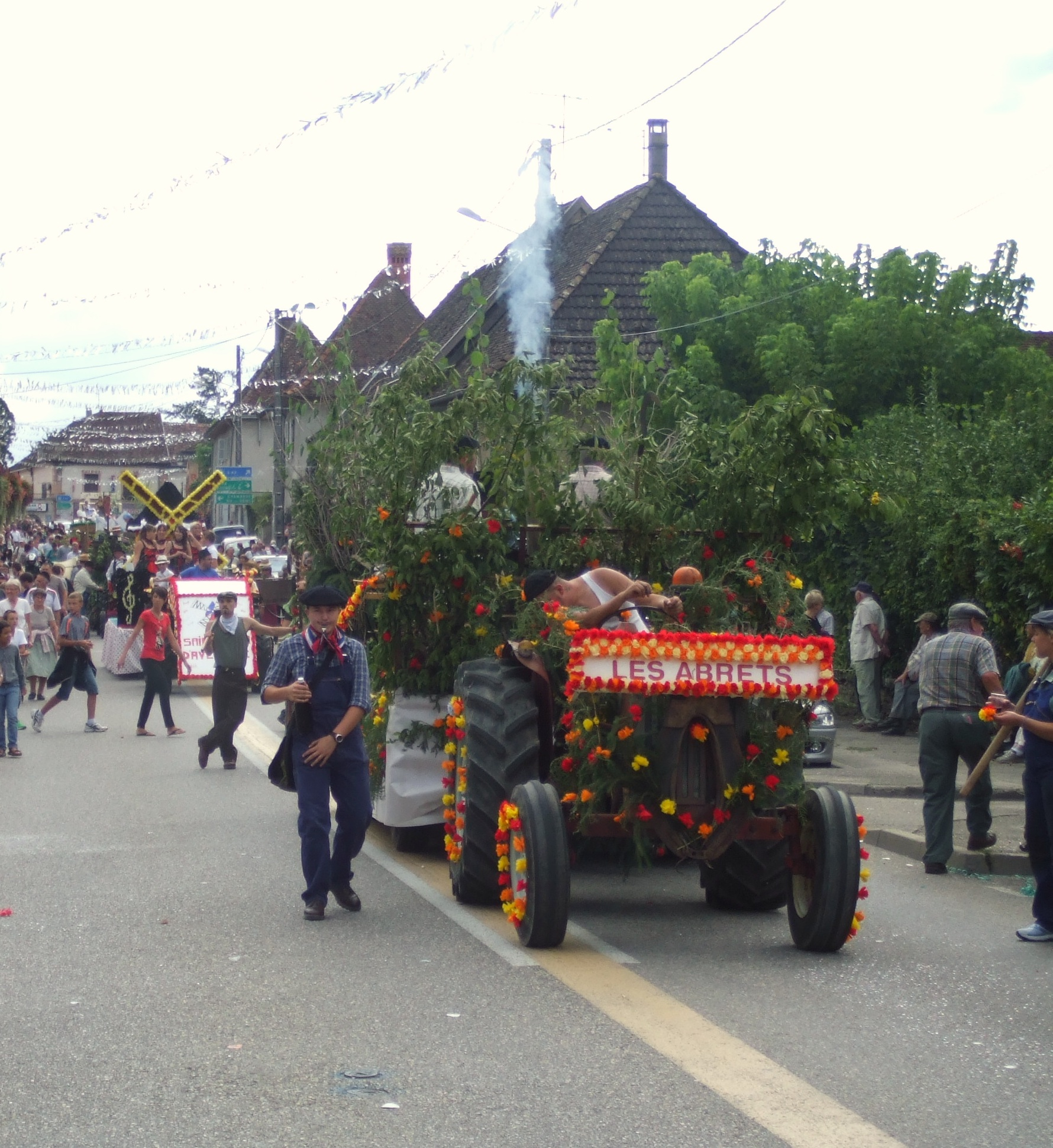 Traversée d'Aoste (Isère) par le corso fleuri du comice agricole de 2012 du canton de Pont-de-Beauvoisin